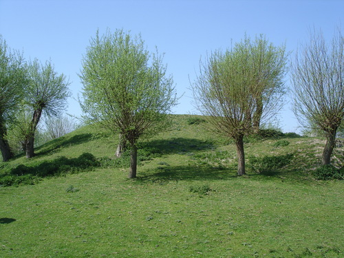 Vliedberg "Berg van Troje"" te Borsselle